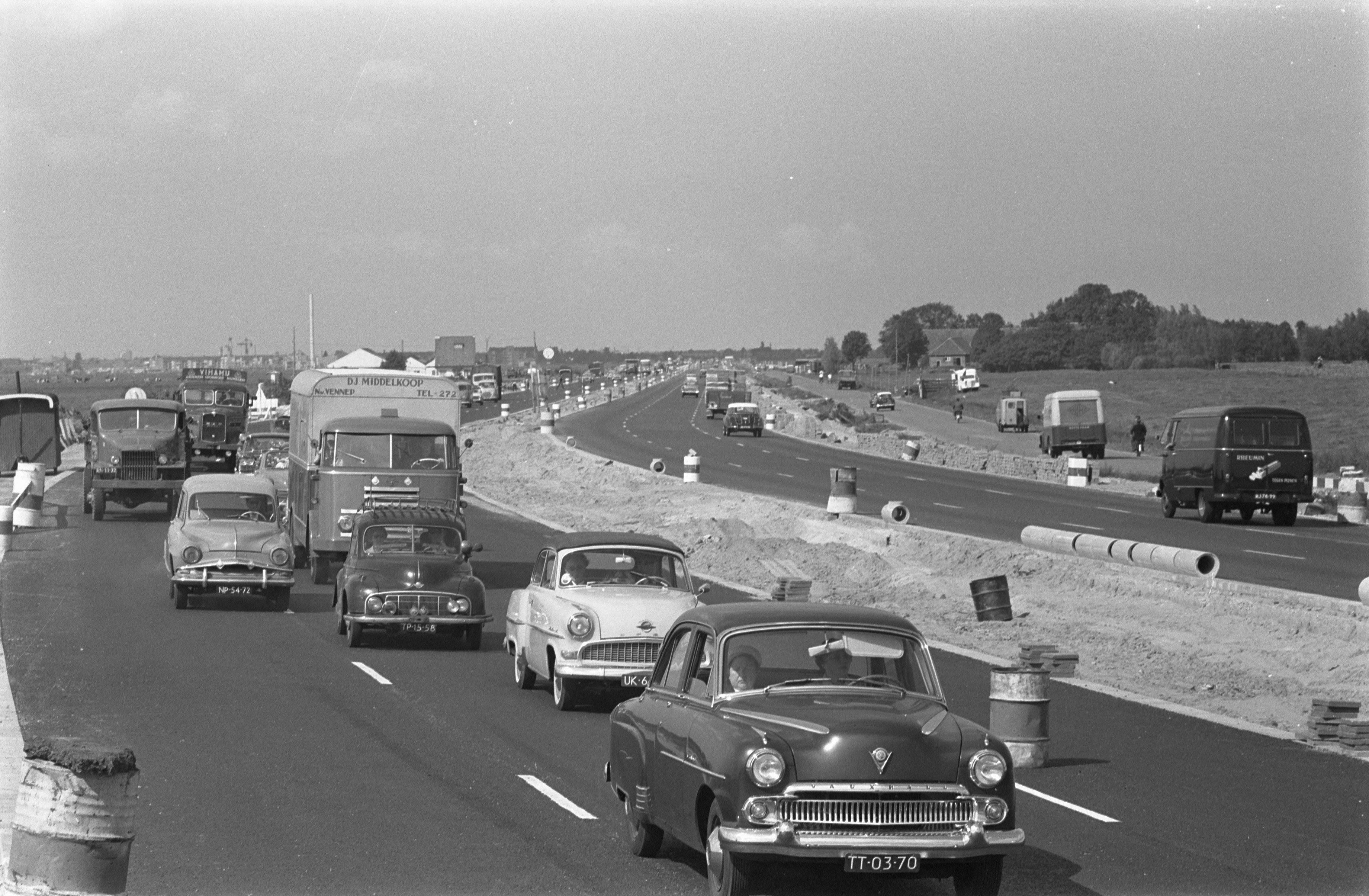 Collectie / Archief : Fotocollectie Anefo Reportage / Serie : [ onbekend ] Beschrijving : Werkzaamheden Rijksweg 13 over van de 6 banenweg Datum : 2 september 1959 Trefwoorden : Rijkswegen, Werkzaamheden Fotograaf : Pot, Harry / Anefo Auteursrechthebbende : Nationaal Archief Materiaalsoort : Negatief (zwart/wit) Nummer archiefinventaris : bekijk toegang 2.24.01.05 Bestanddeelnummer : 910-6442